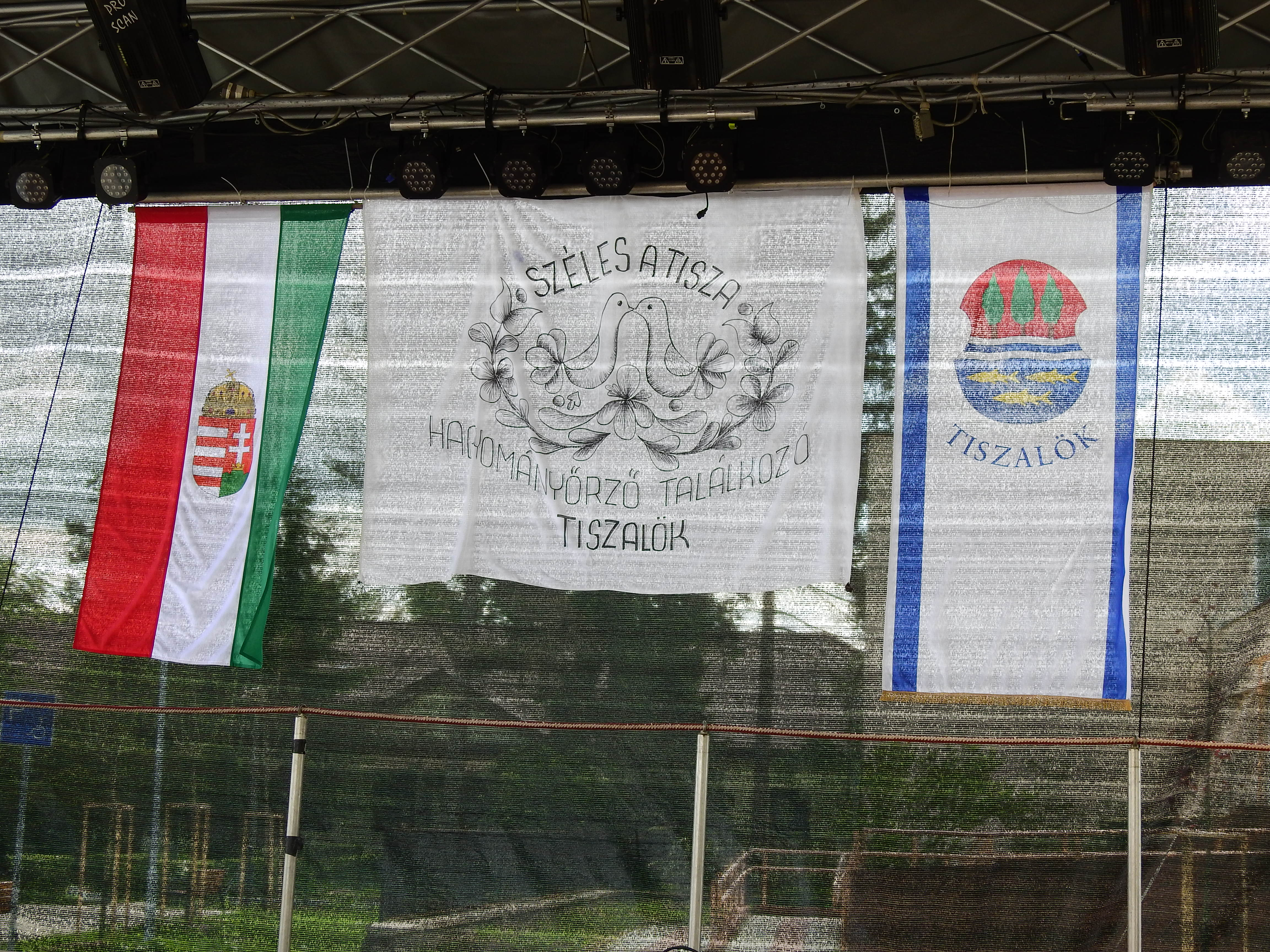 Széles a Tisza Tiszalökön